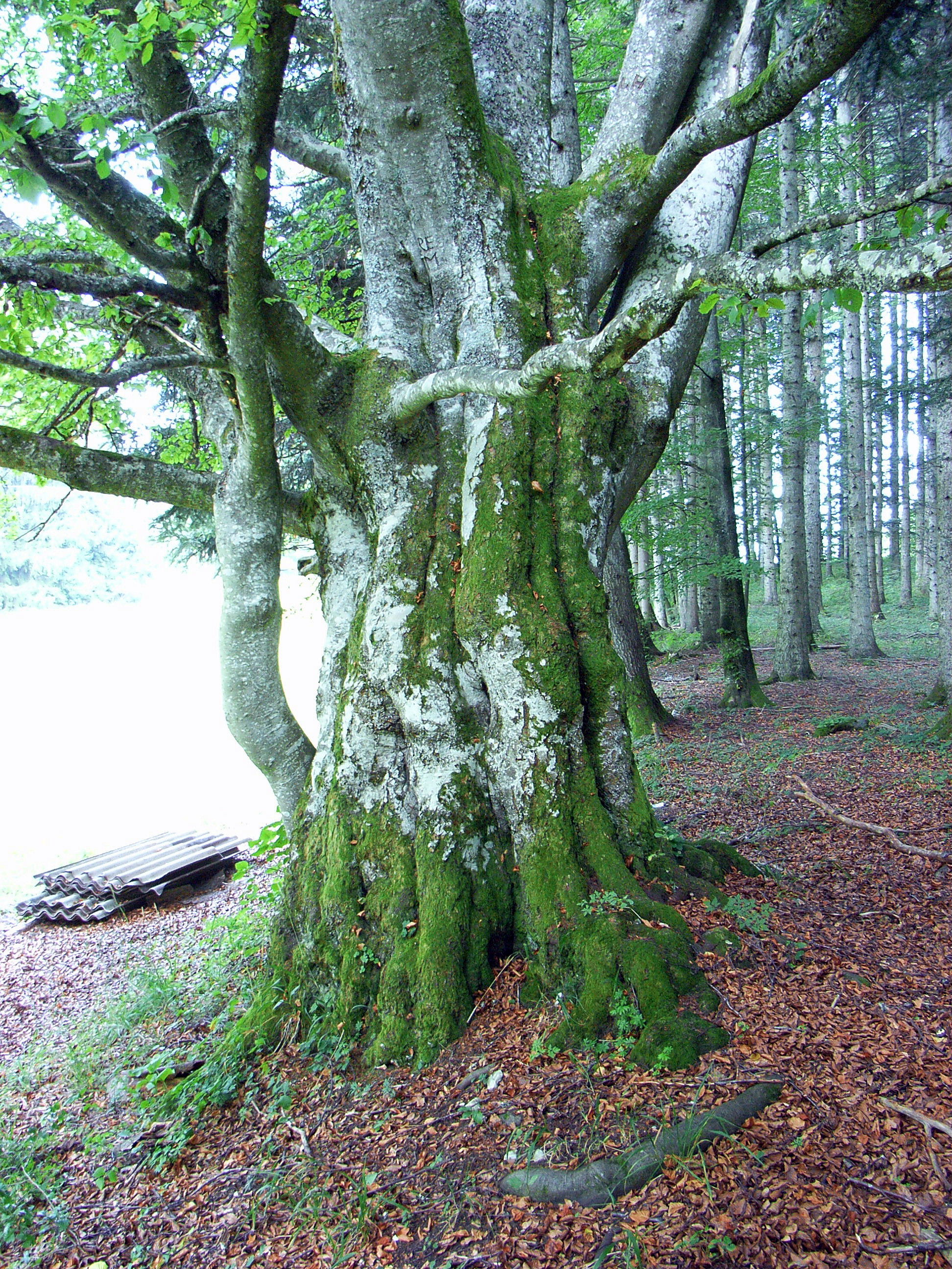 aus 13 Stämmen zusammengewachsener Baum